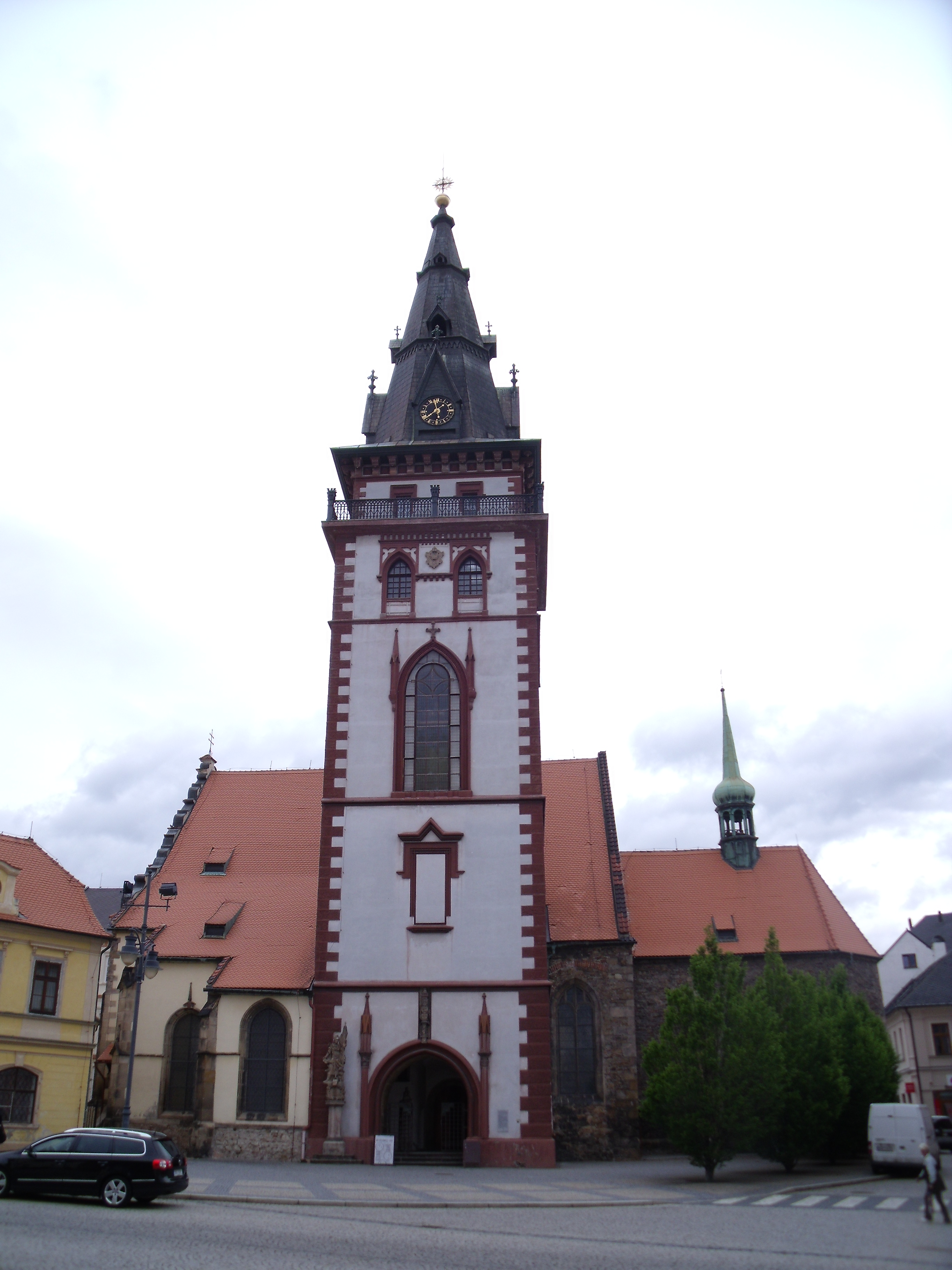 Jižní pohled na kostel s Mšstskou věží z náměstí 1. Máje.